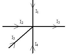 Skissa af Straum Lögmálinu